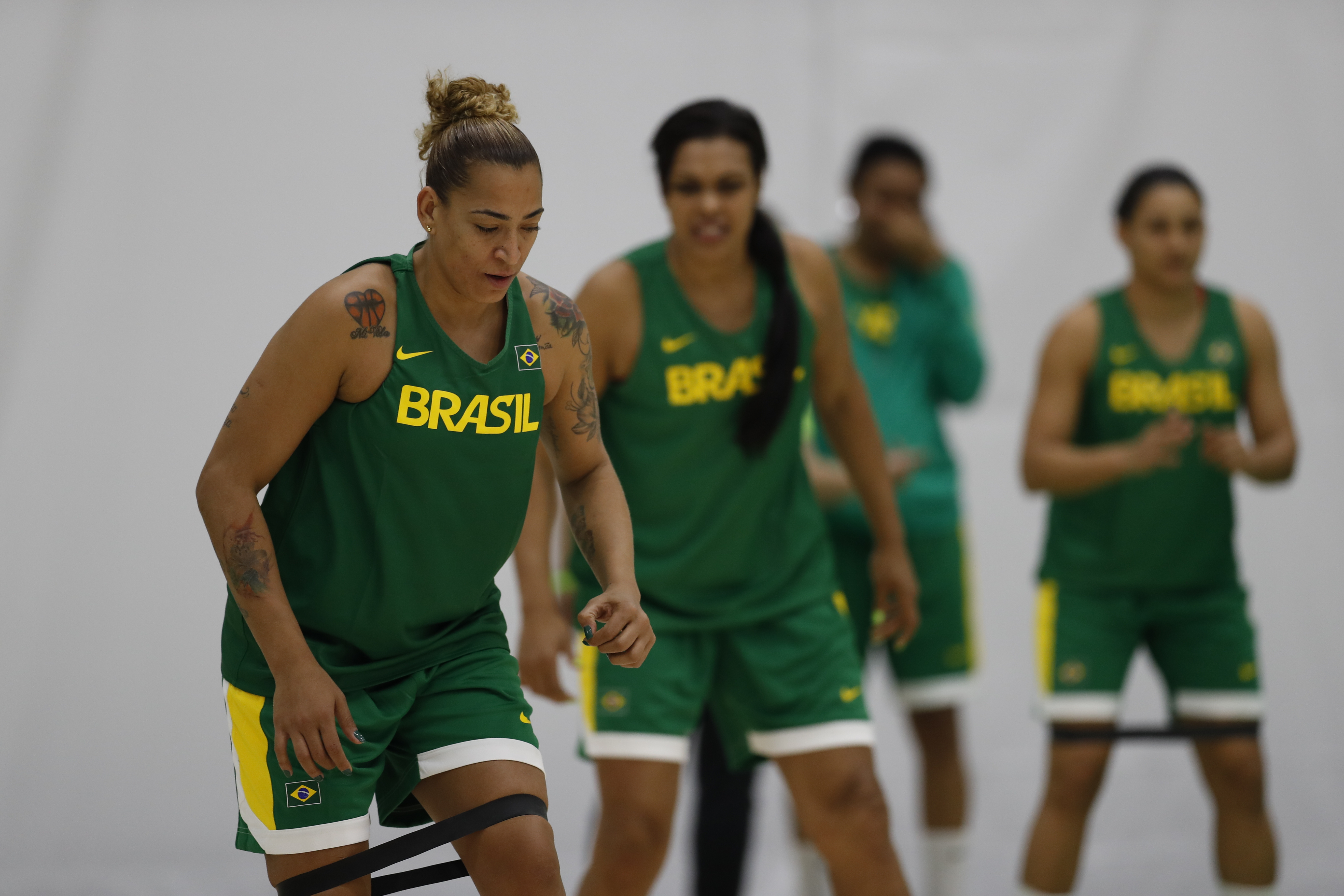 Rio de Janeiro - Equipe brasileira de basquete feminino treina pela primeira vez no Parque dos Atletas para os Jogos Olímpicos Rio 2016 (Fernando Frazão/Agência Brasil)